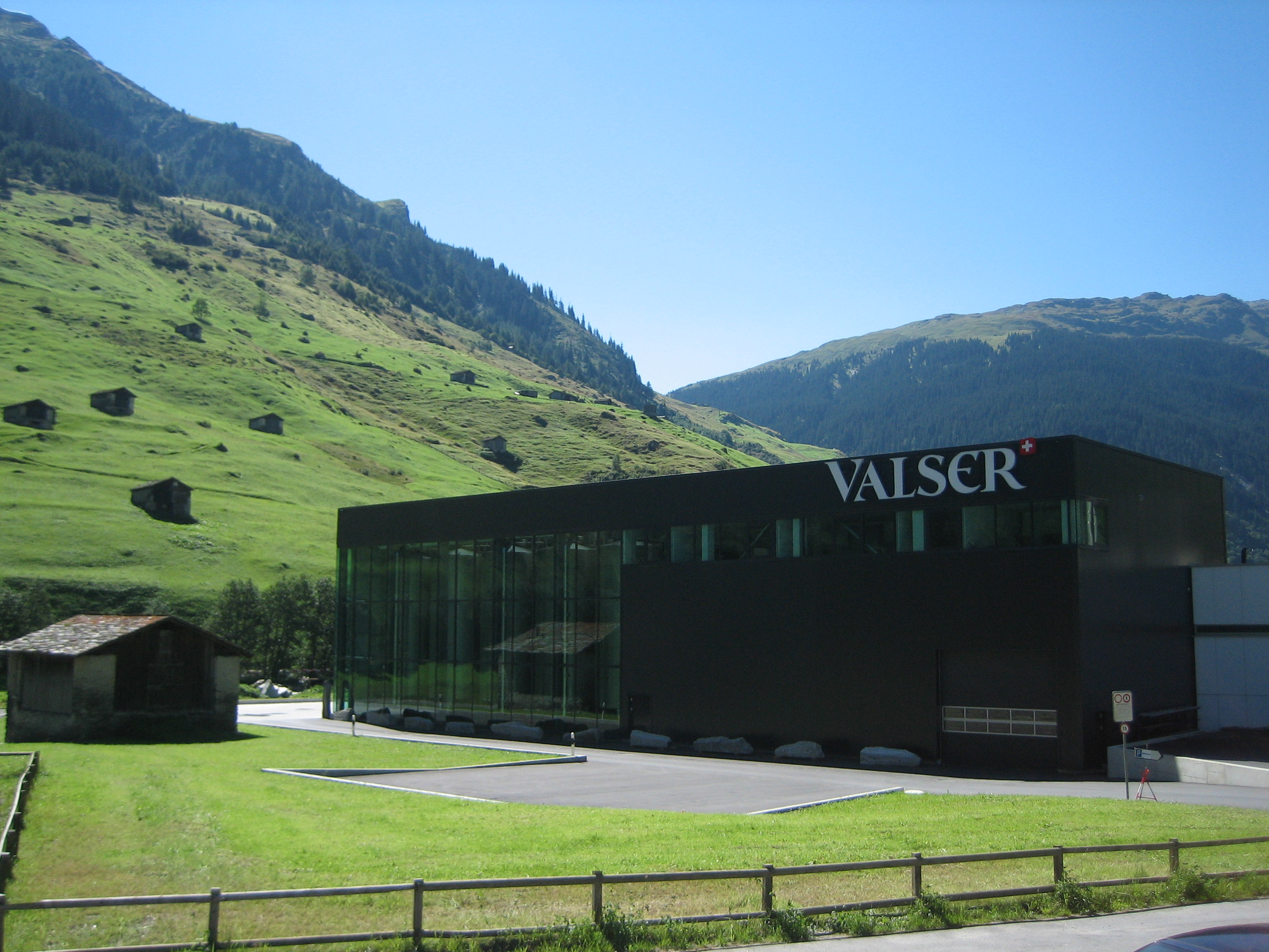 Valserquelle